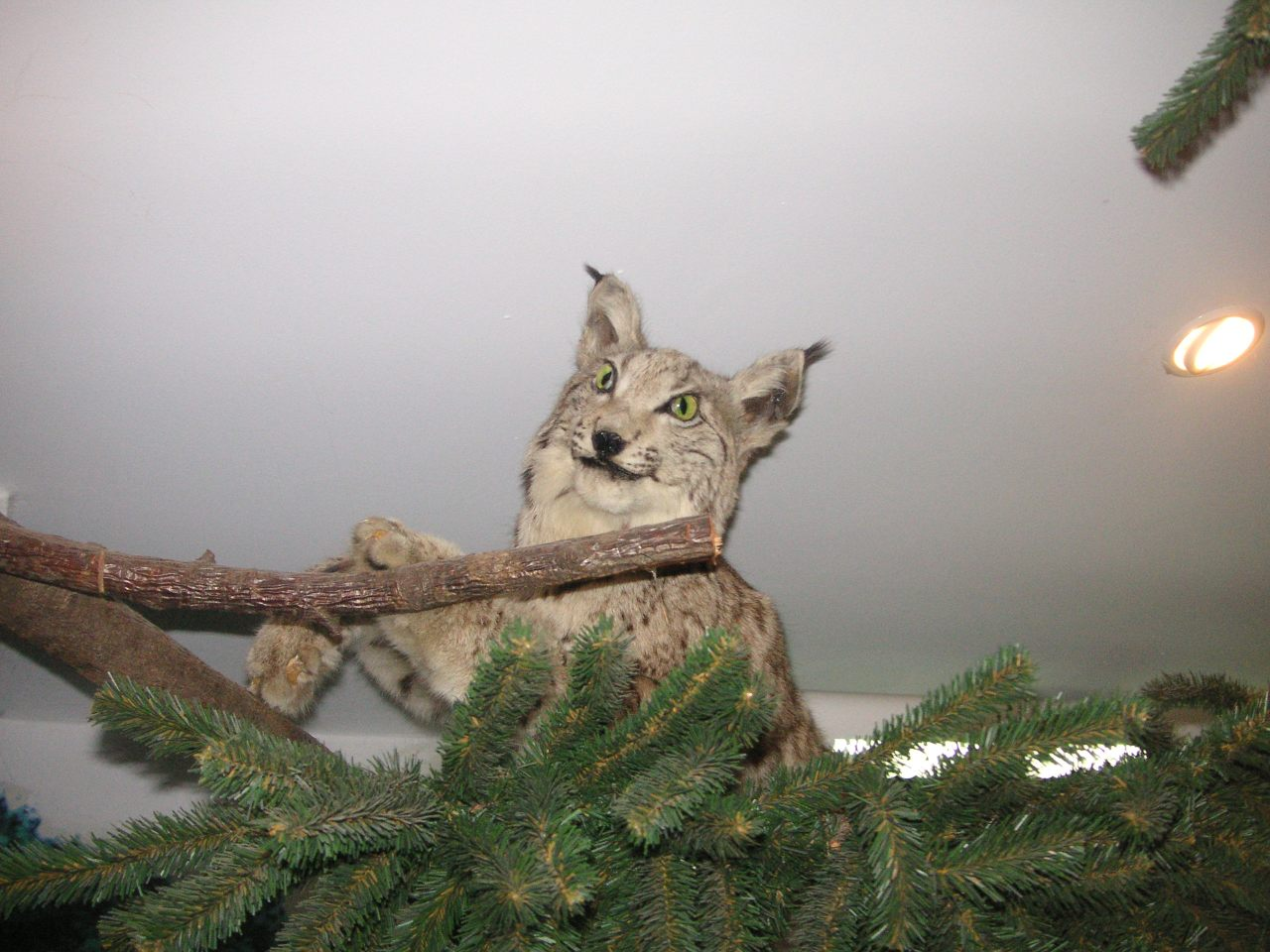 Wypchany ryś w Ośrodku Edukacyjnym Babiogórskiego Parku Narodowego, Zawoja